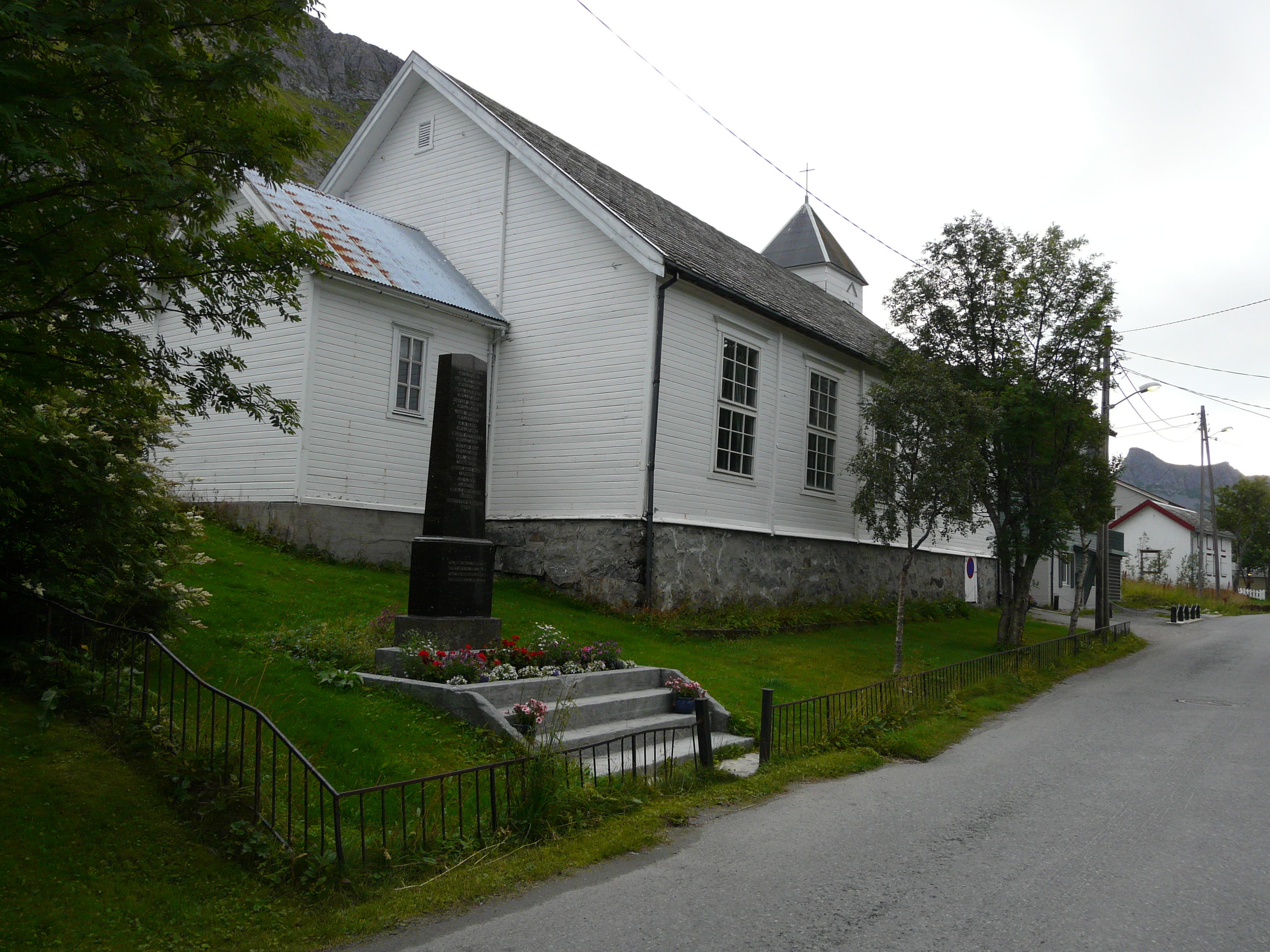 Gryllefjord kapell i Gryllefjord, Torsken, Midt-Troms.